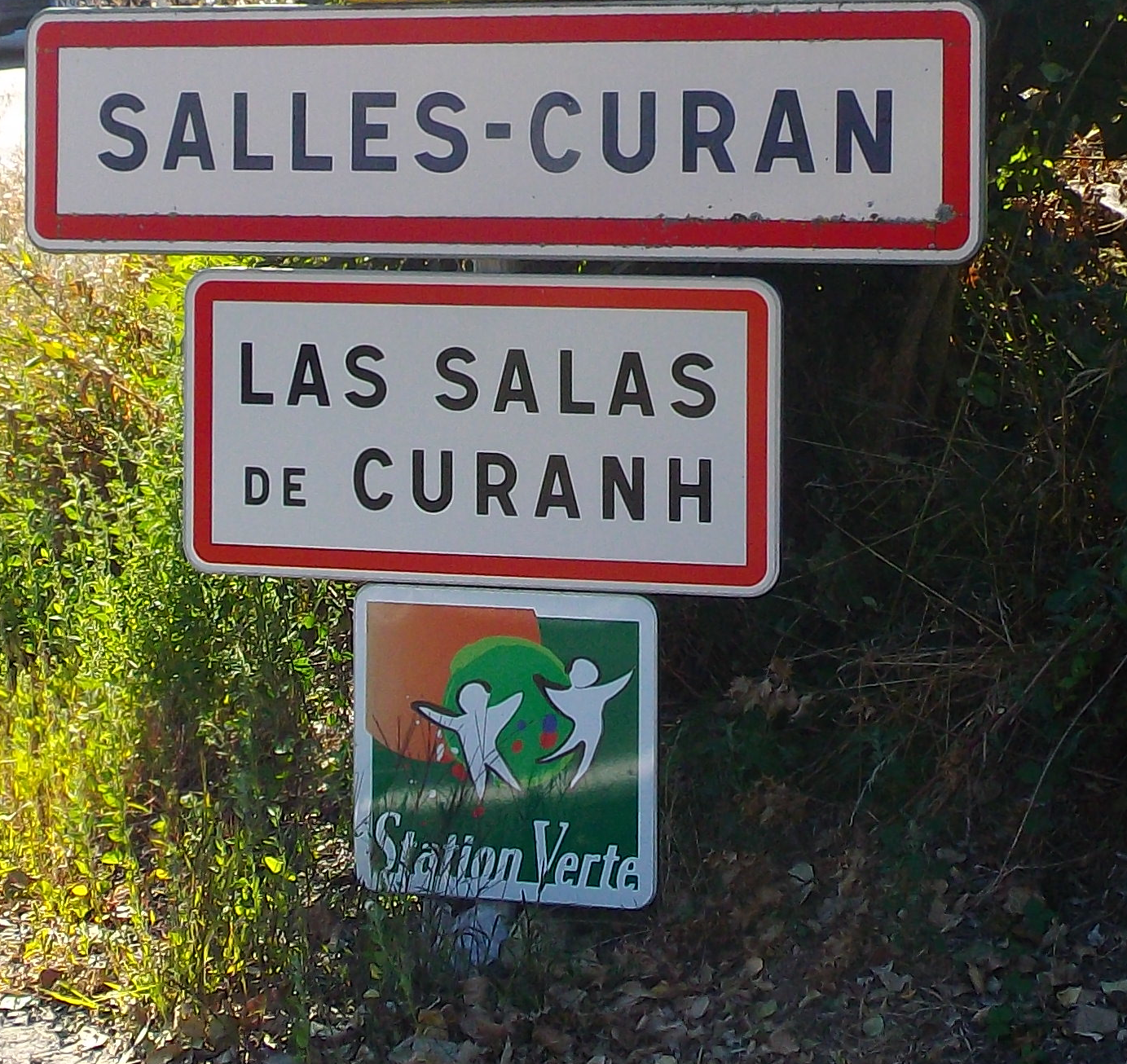 Panneau bilingue français-occitan à l'entrée de Salles-Curan (Aveyron, France)